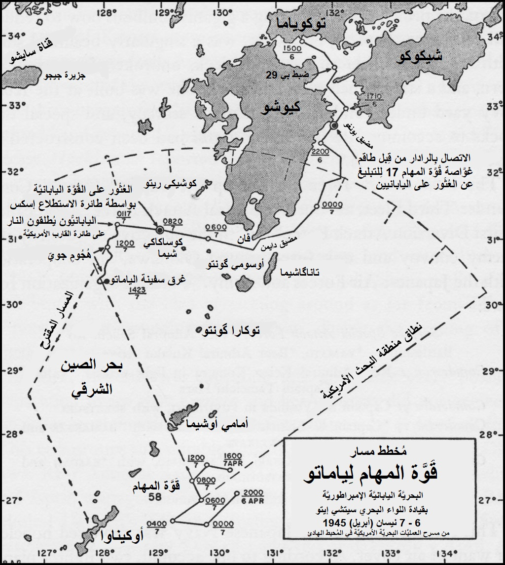 خط سير قوة الهُجوم اليابانية في عمليَّة تن - غو العسكريَّة. تكوَّنت قُوَّة الهُجُوم المذكورة من البارجة ياماتو، والطرَّاد ياهاگي، وثمانية مُدمِّرات، خلال الخُرُوج الأخير إلى أوكيناوا في شهر نيسان (أبريل) 1945م. وذلك استنادًا إلى المعلومات التي أدلى بها المُعتقلون اليابانيُّون بُعيد استسلام اليابان.